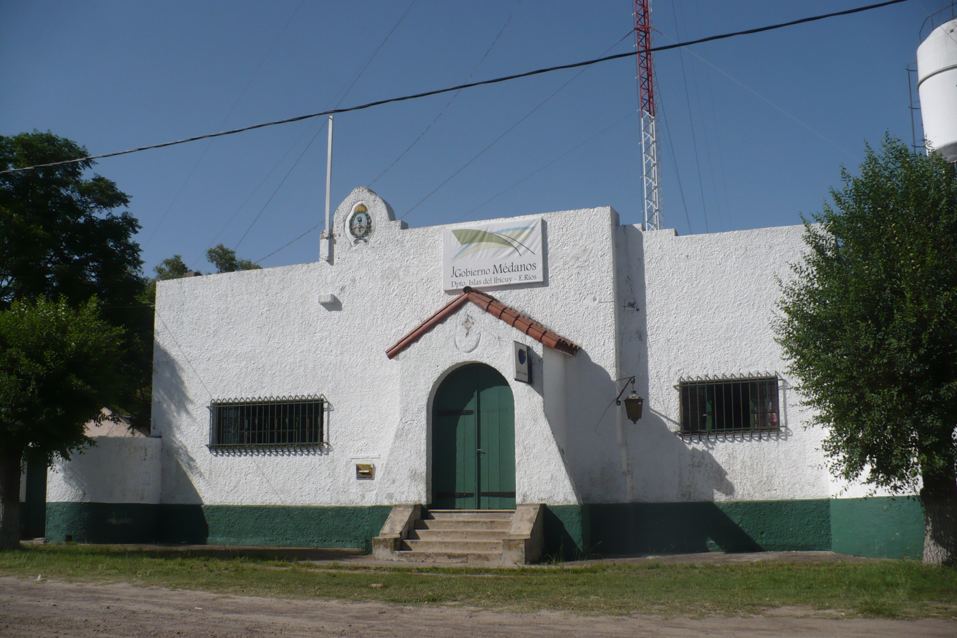 Esta es la sede gubernamental de la Junta de Gobierno - futura Comuna - de la localidad de Médanos, provincia de Entre Ríos